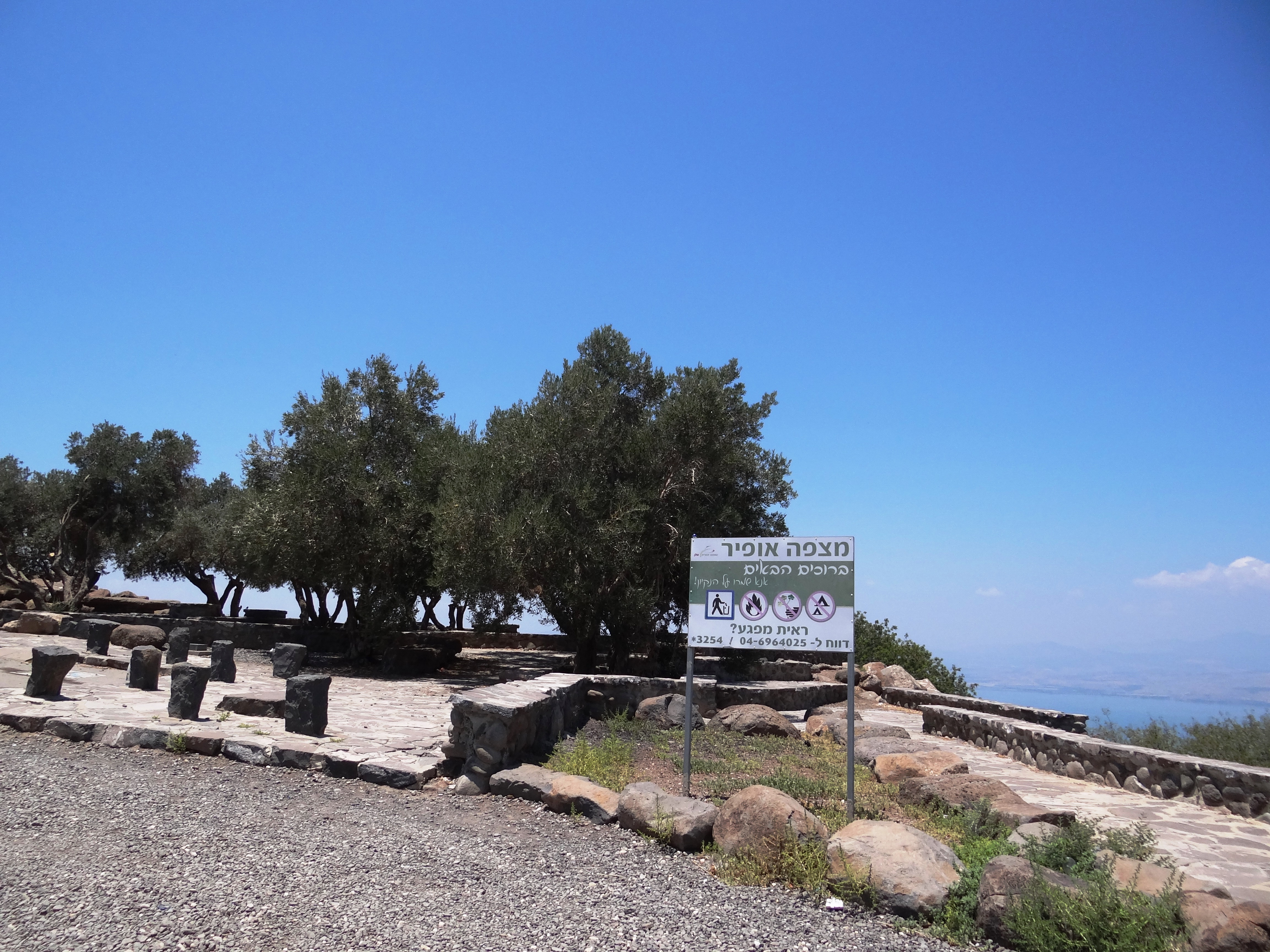 מצפה אופיר ברמת הגולן ליד היישוב גבעת יואב חלקה הצפוני של הכנרת. המצפה הוקם לזכרו של אופיר שנפטר בגיל 16 על ידי אביו